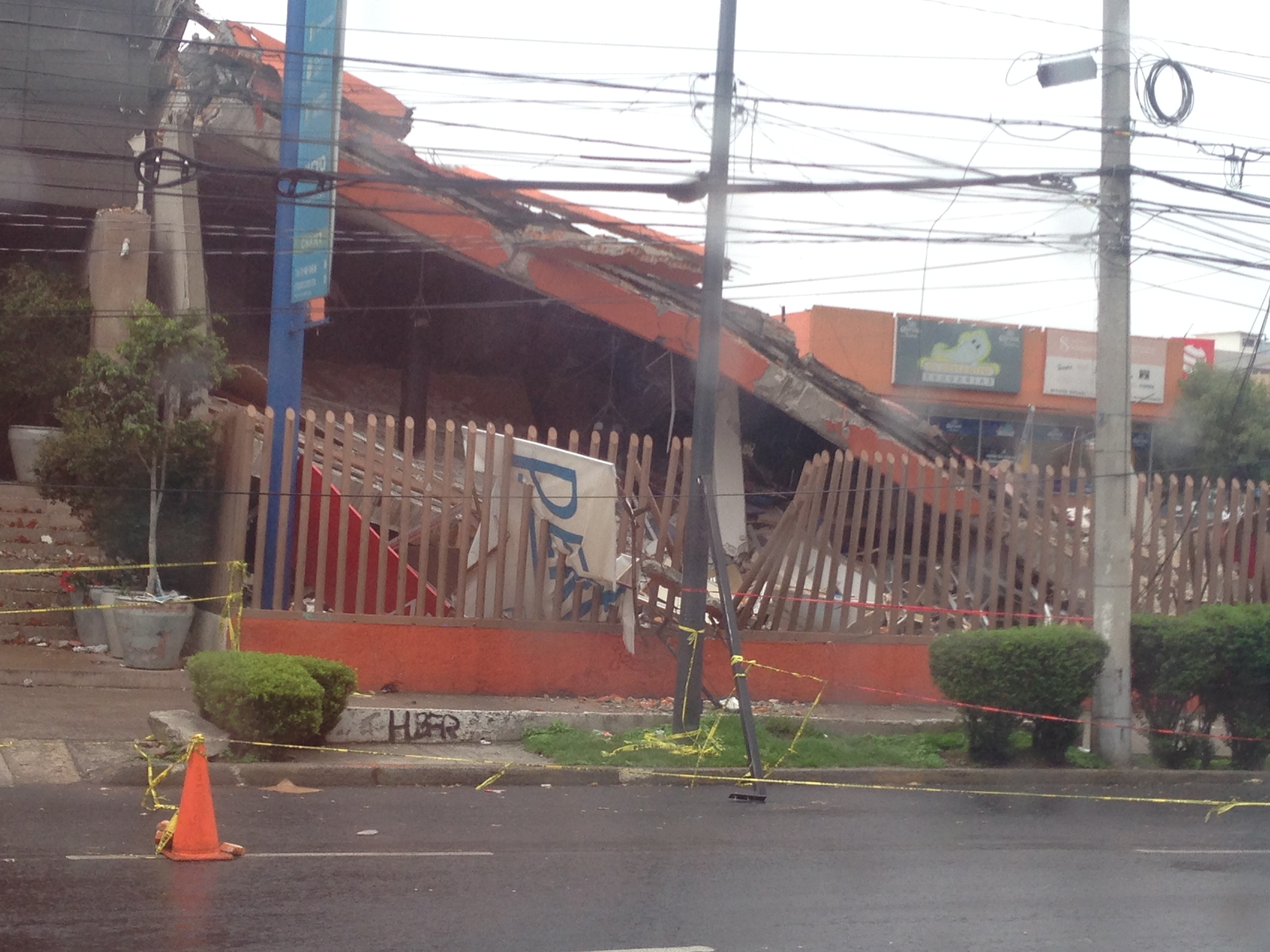 Locales de una plaza colapsada en Villa Coapa. Calzada del Hueso esquina con Canal de Miramontes.